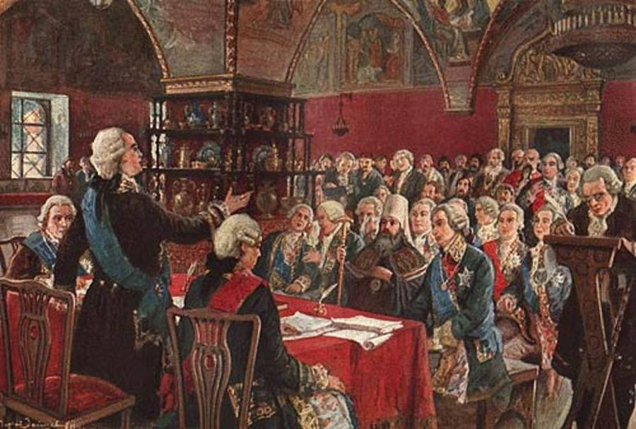 Заседание Уложенной комиссии 1767 г.